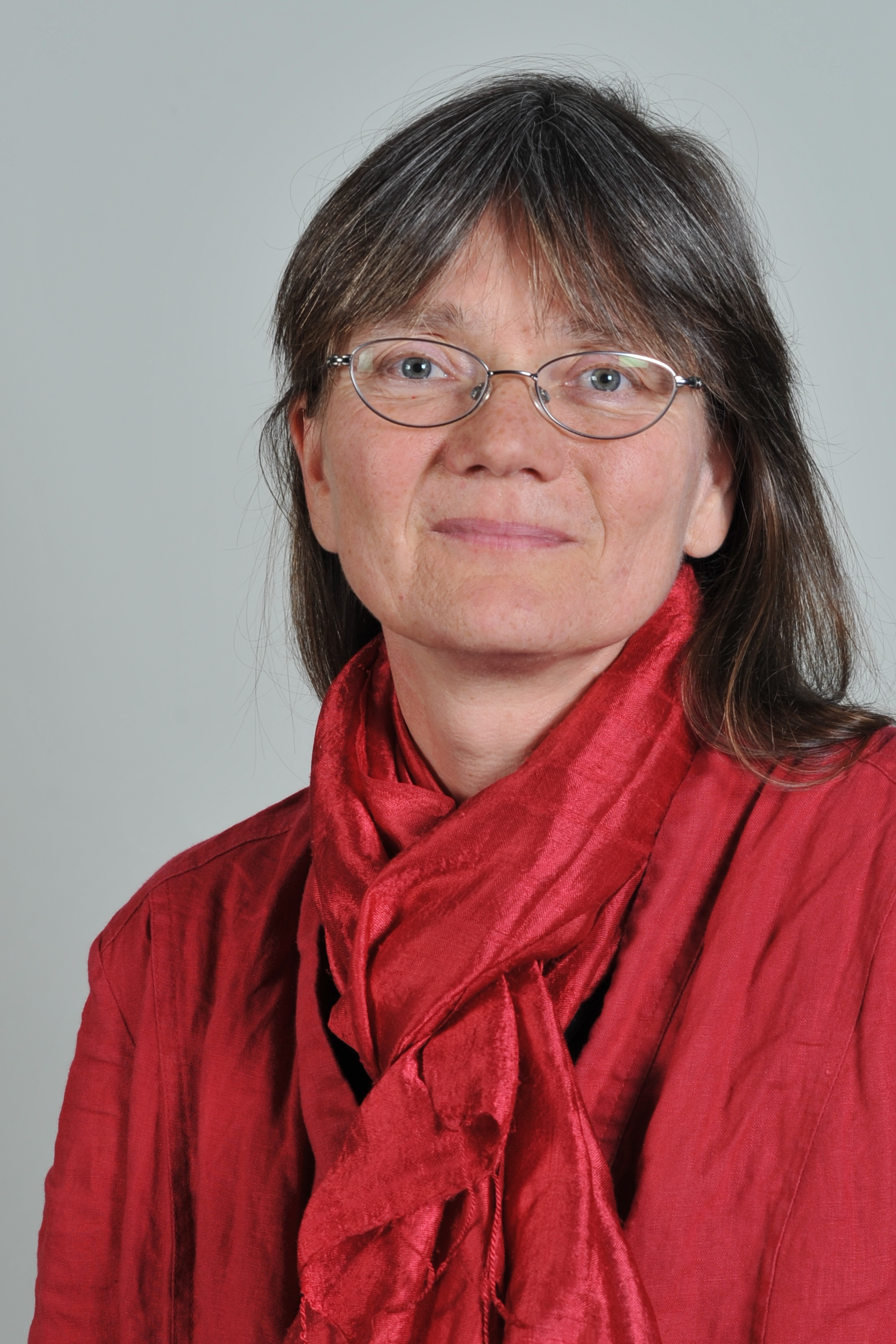 Landtagsprojekt Mecklenburg-Vorpommern 2013: Ursula Karlowski, Bündnis 90 / Die Grünen